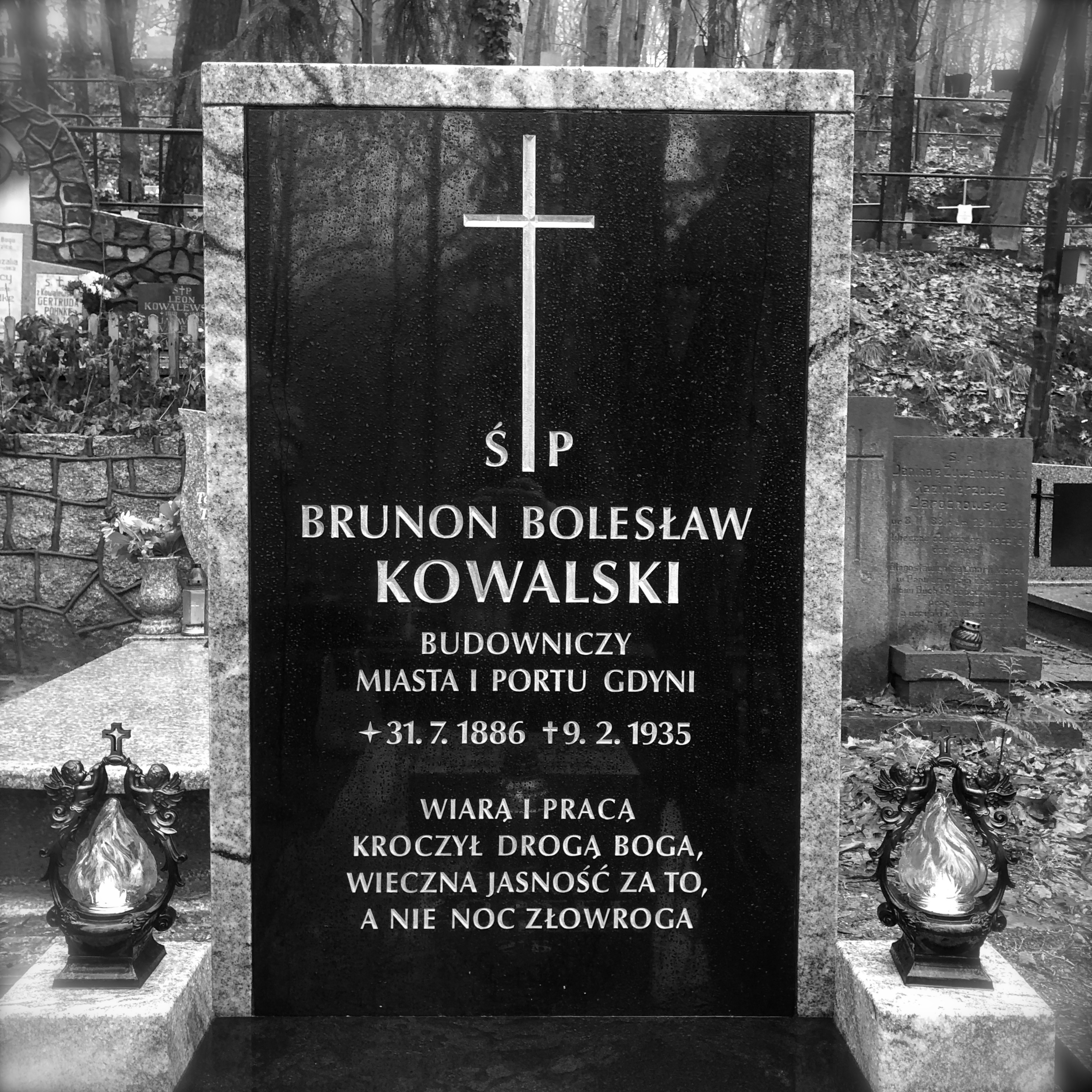 Nagrobek Brunona Kowalskiego, Cmentarz Witominski, Gdynia